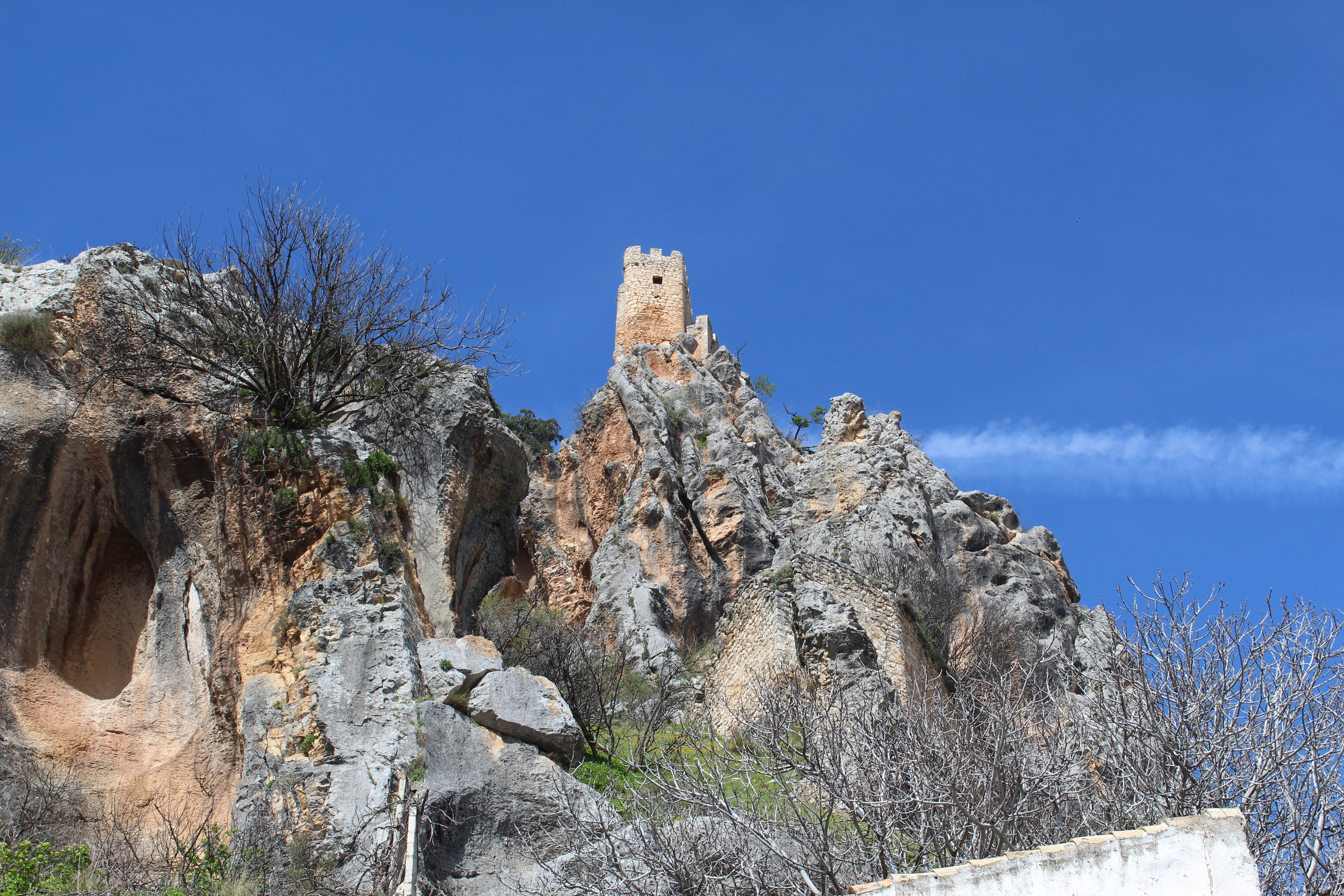 Vista del Castillo de Albanchez de Mágina desde el pueblo.